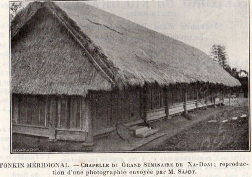 Chapelle du grand séminaire de Xa Doiai au Tonkin méridional, aujourd'hui diocèse de Vinh. Reproduction d'une photographie de 1893. MEP.